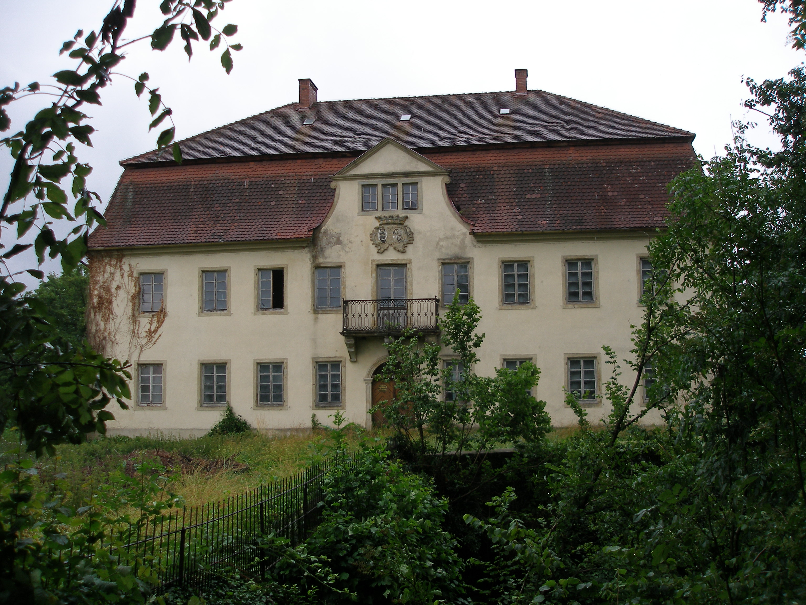 Schloss Horn, Göggingen (Ostabkreis), mit Wappenrelief, Allianzwappen Schwarzach zu Horn / Hohenfeld